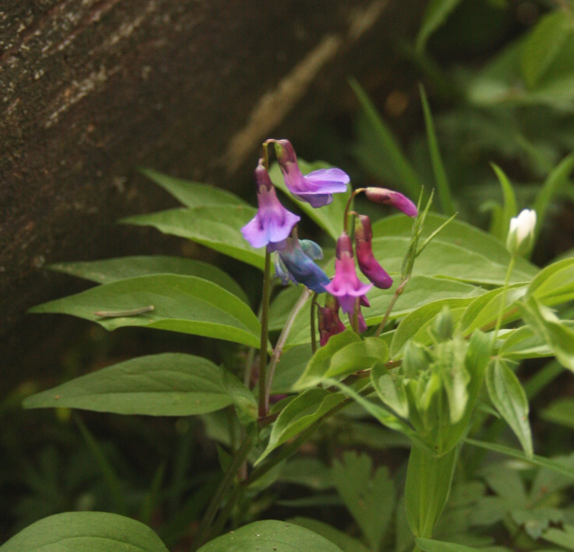 Groszek wiosenny